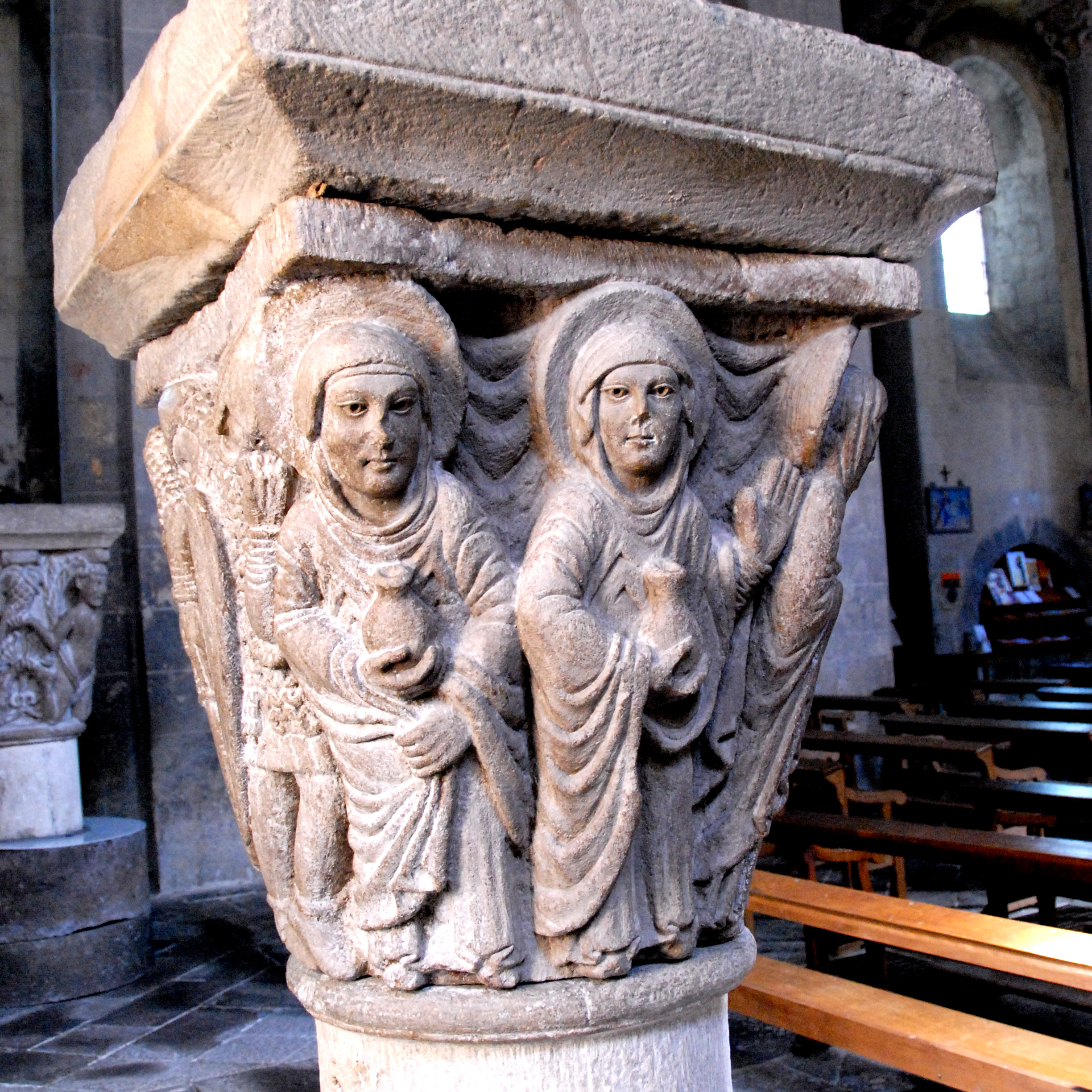 Mozat; Kapitell 2, Die heiligen Frauen